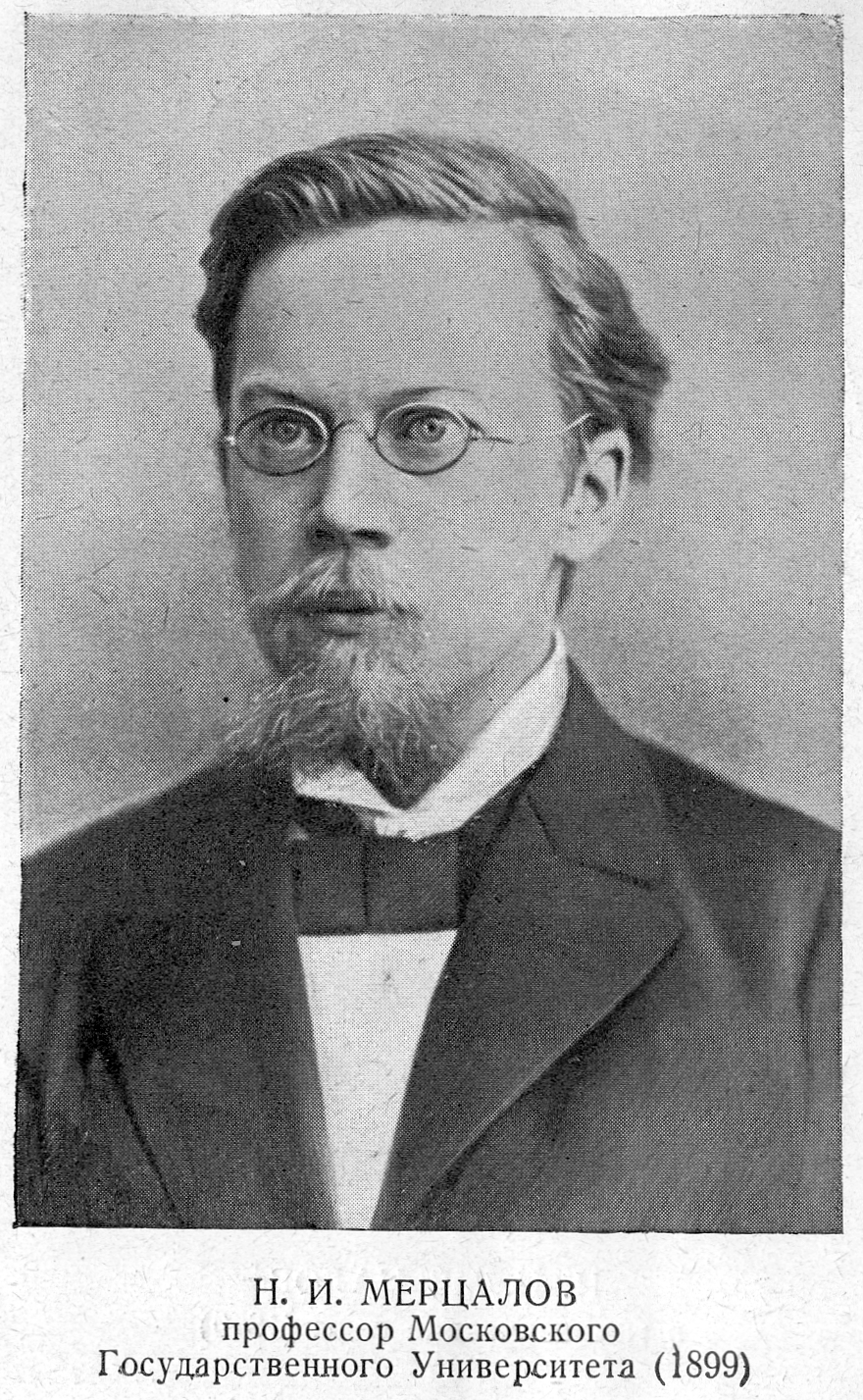 Николай Иванович Мерцалов — профессор Московского университета